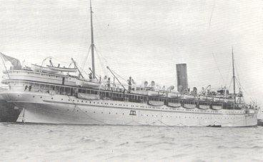 SS Rewa